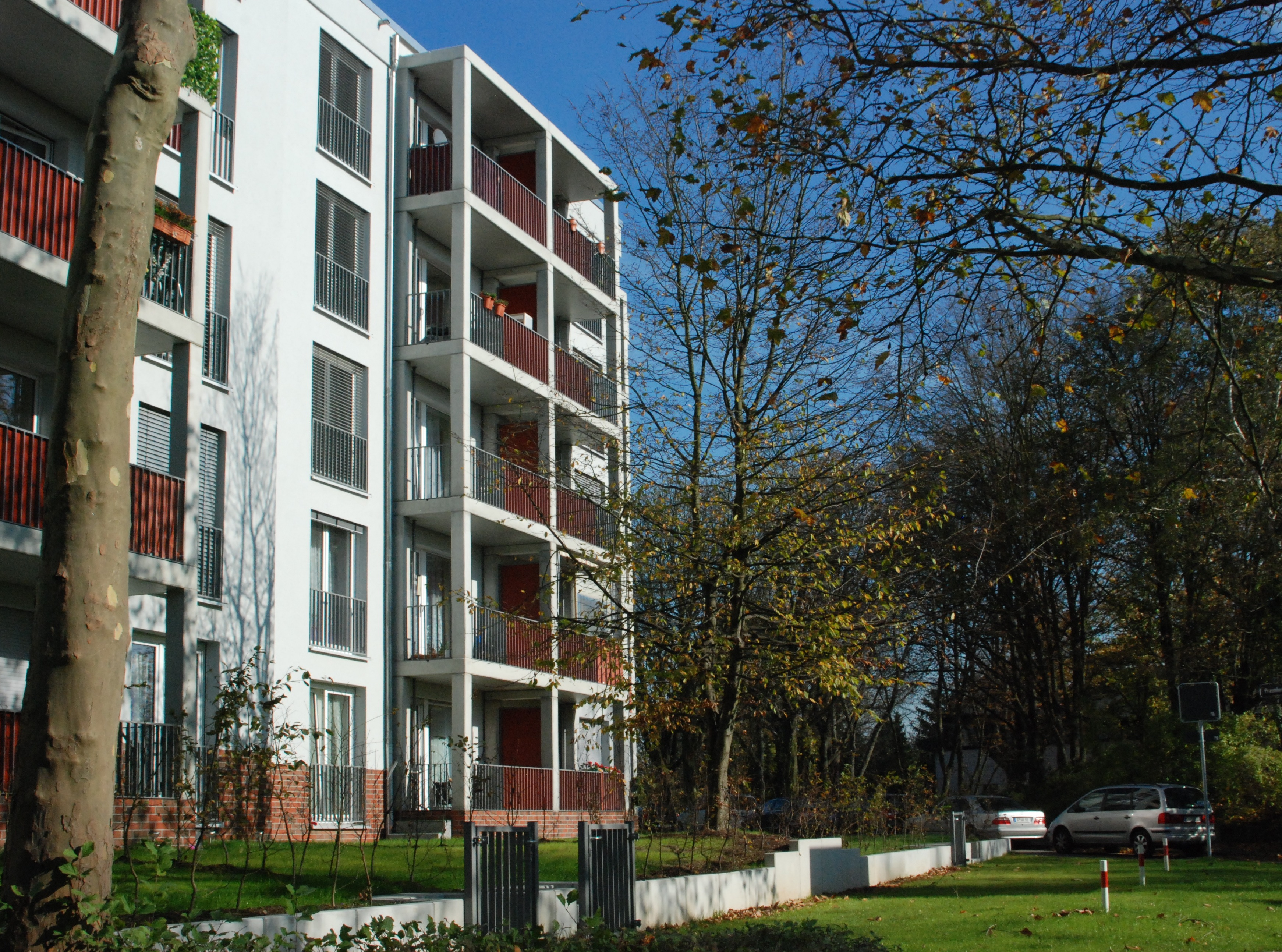 Frankfurt-Praunheim, Heinrich-Lübke-Siedlung, Wohnhochhaus am Anfang der Heinrich-Lübke-Straße